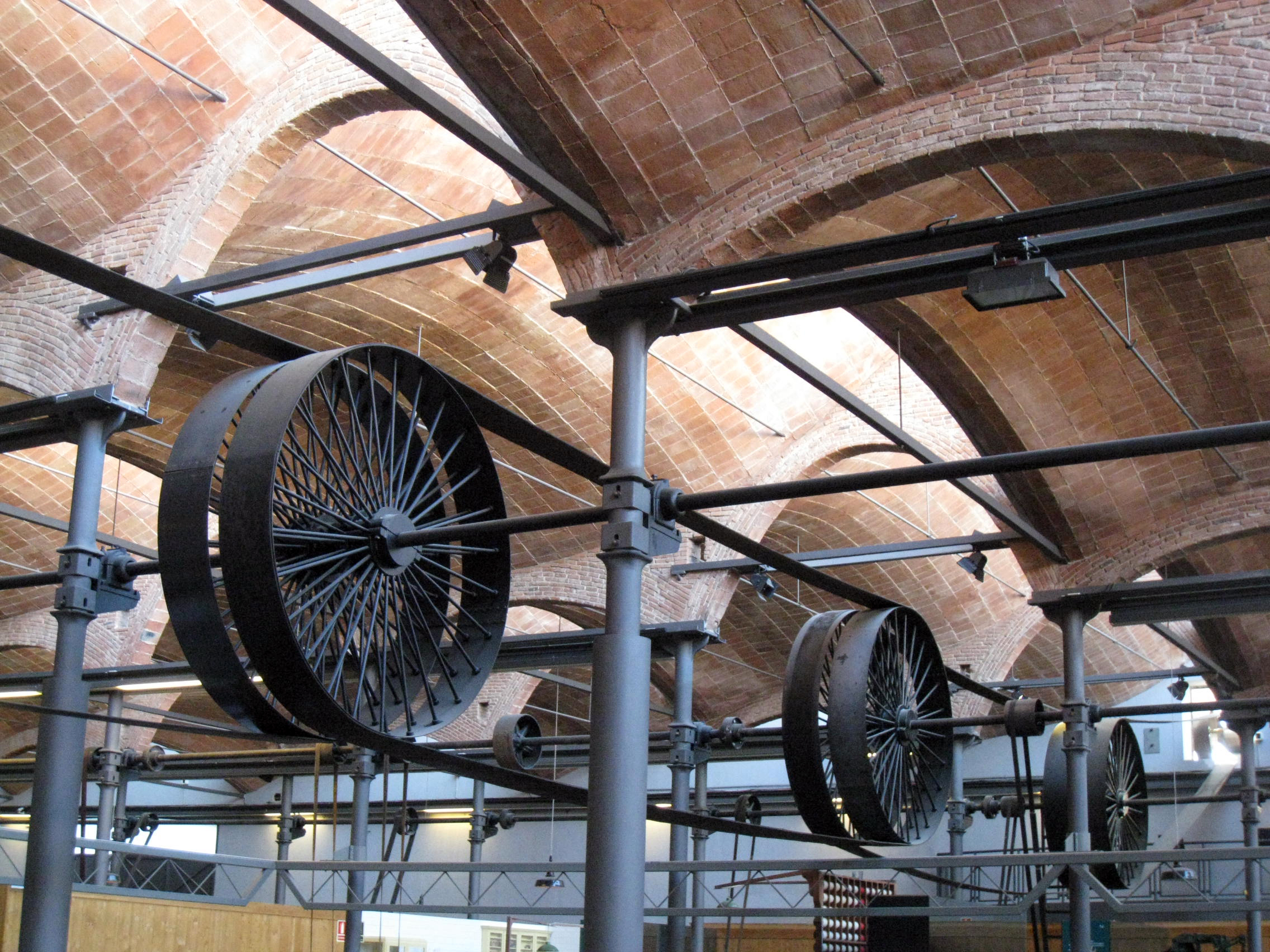 Fàbrica Aymerich, Amat i Jover (Terrassa) Object location41° 33′ 54.49″ N, 2° 00′ 28.14″ E